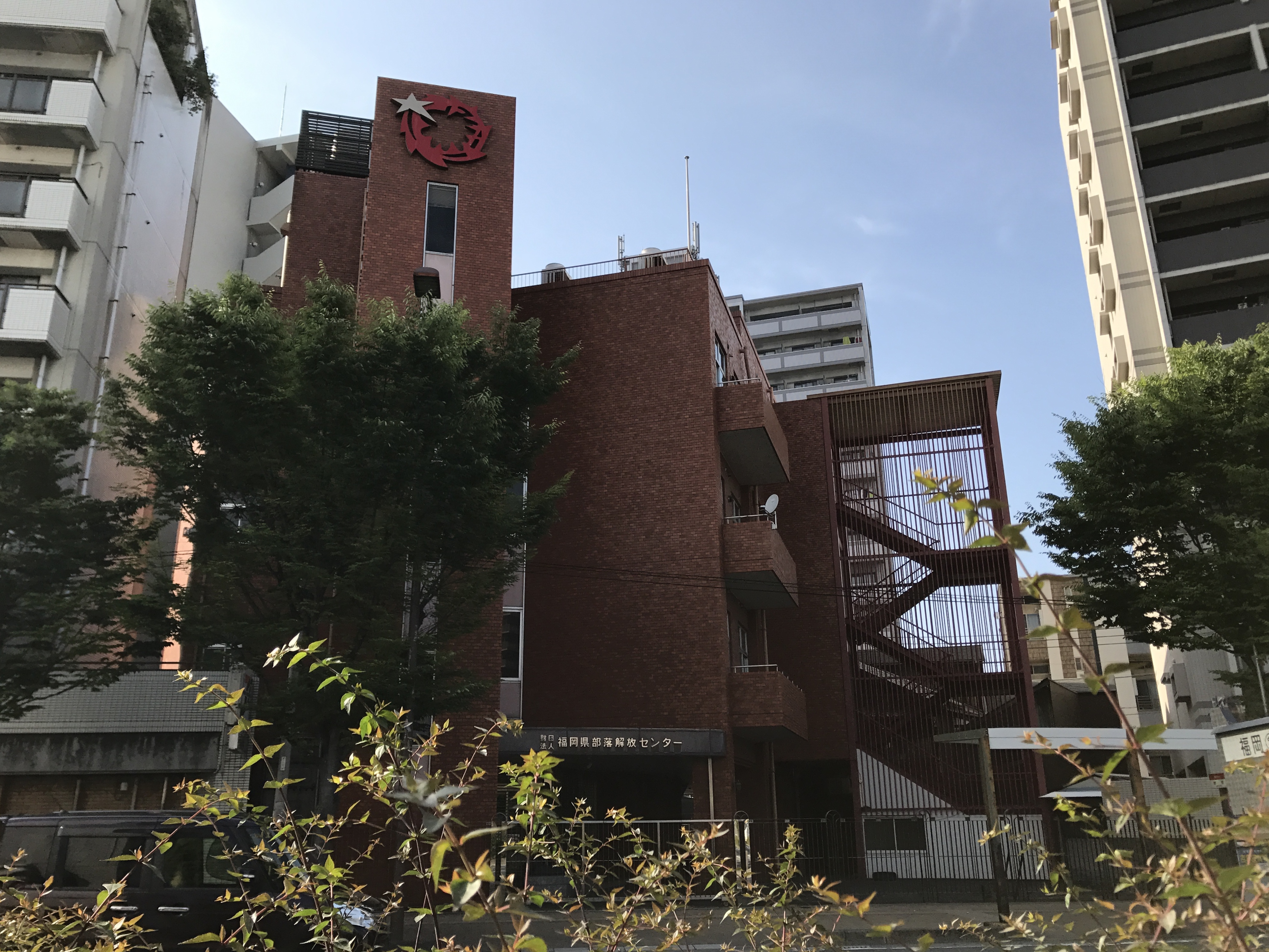 福岡県部落解放センター